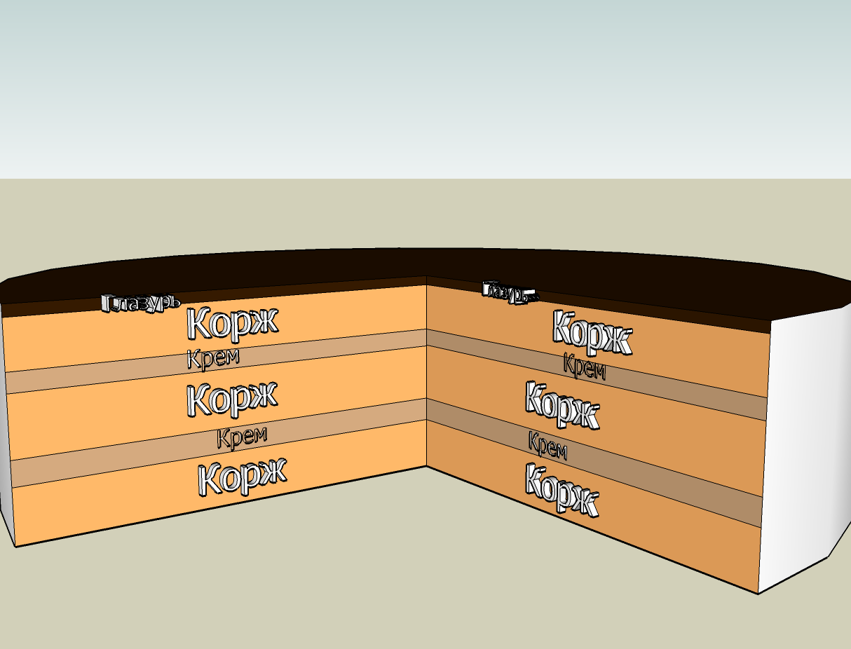 Структура Торта "Космос"